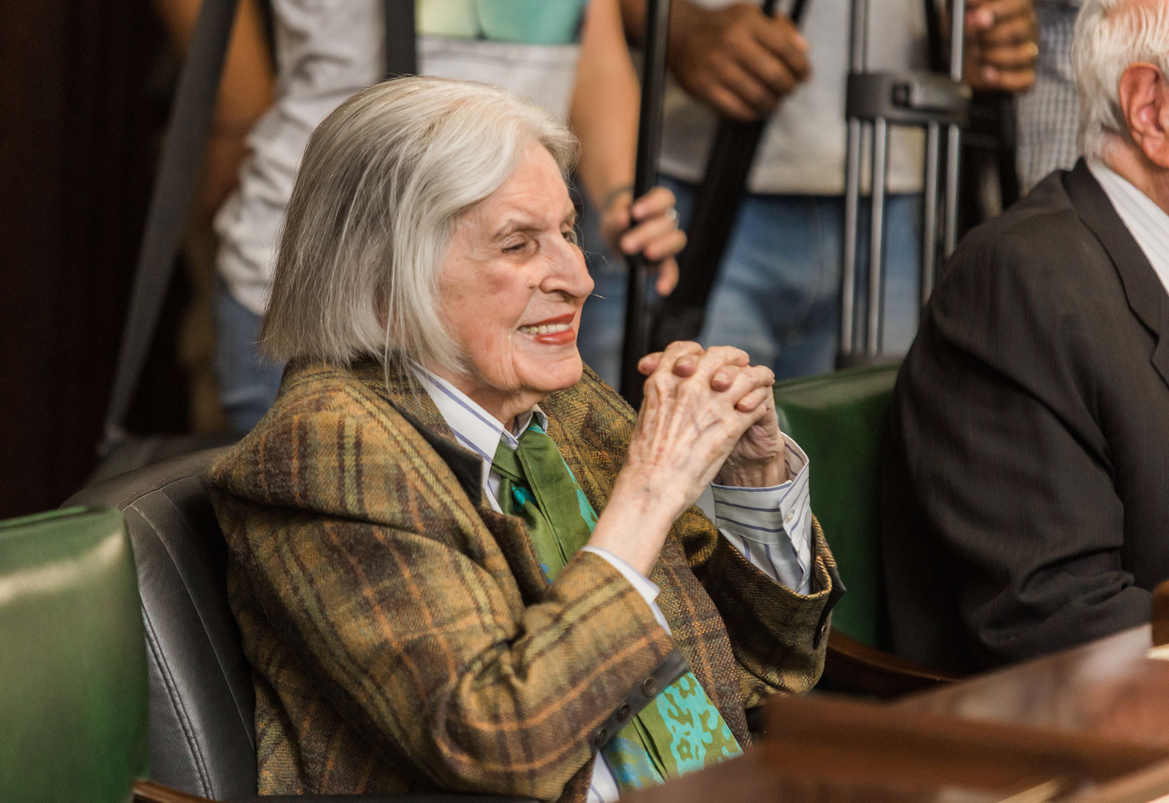 O Governador do Estado de São Paulo, Geraldo Alckmin, participou da INAUGURAÇÃO DA FACHADA DO EDIFÍCIO DA ACADEMIA PAULISTA DE LETRAS – APL. Local: São Paulo/SP. Data: 19/10/2017. Foto: Alexandre Carvalho/A2img